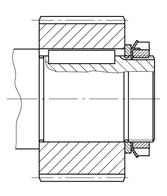 parallel keys designed bei B. Gieseler, Berlin